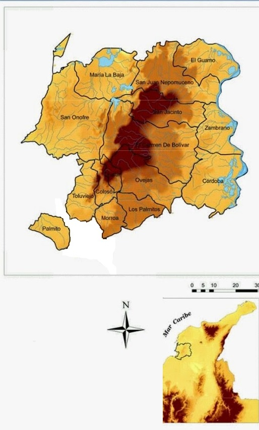 Mapa Físico-Político de la Región Montes de Maria